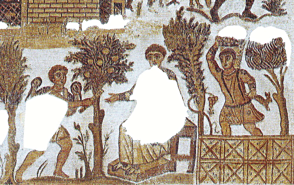 La proprietà del signore Giulio proveniente da Cartagine conservata al Bardo di Tunisi